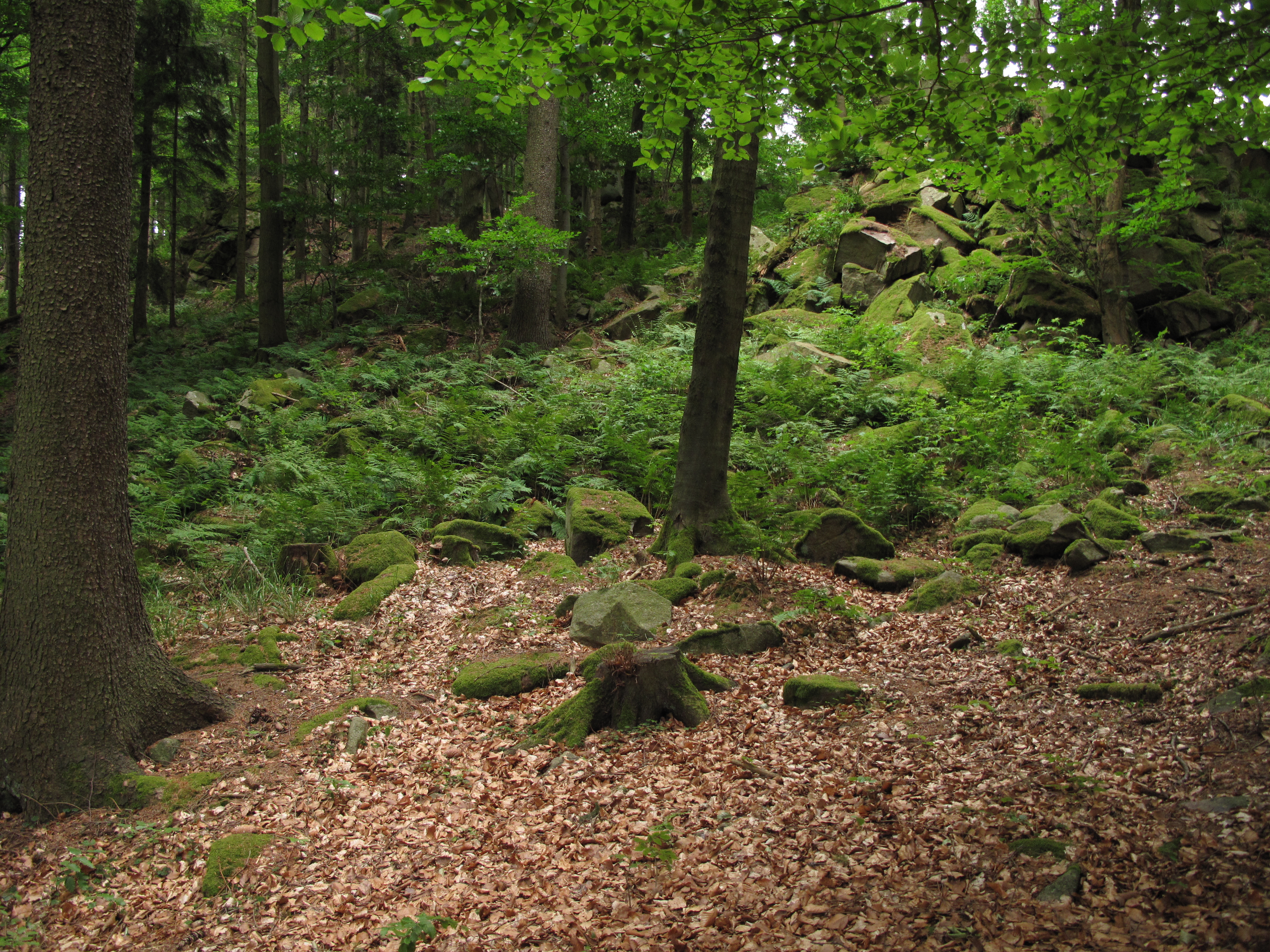 Přírodní památka Přední skála. Okres Jihlava, Česká republika.